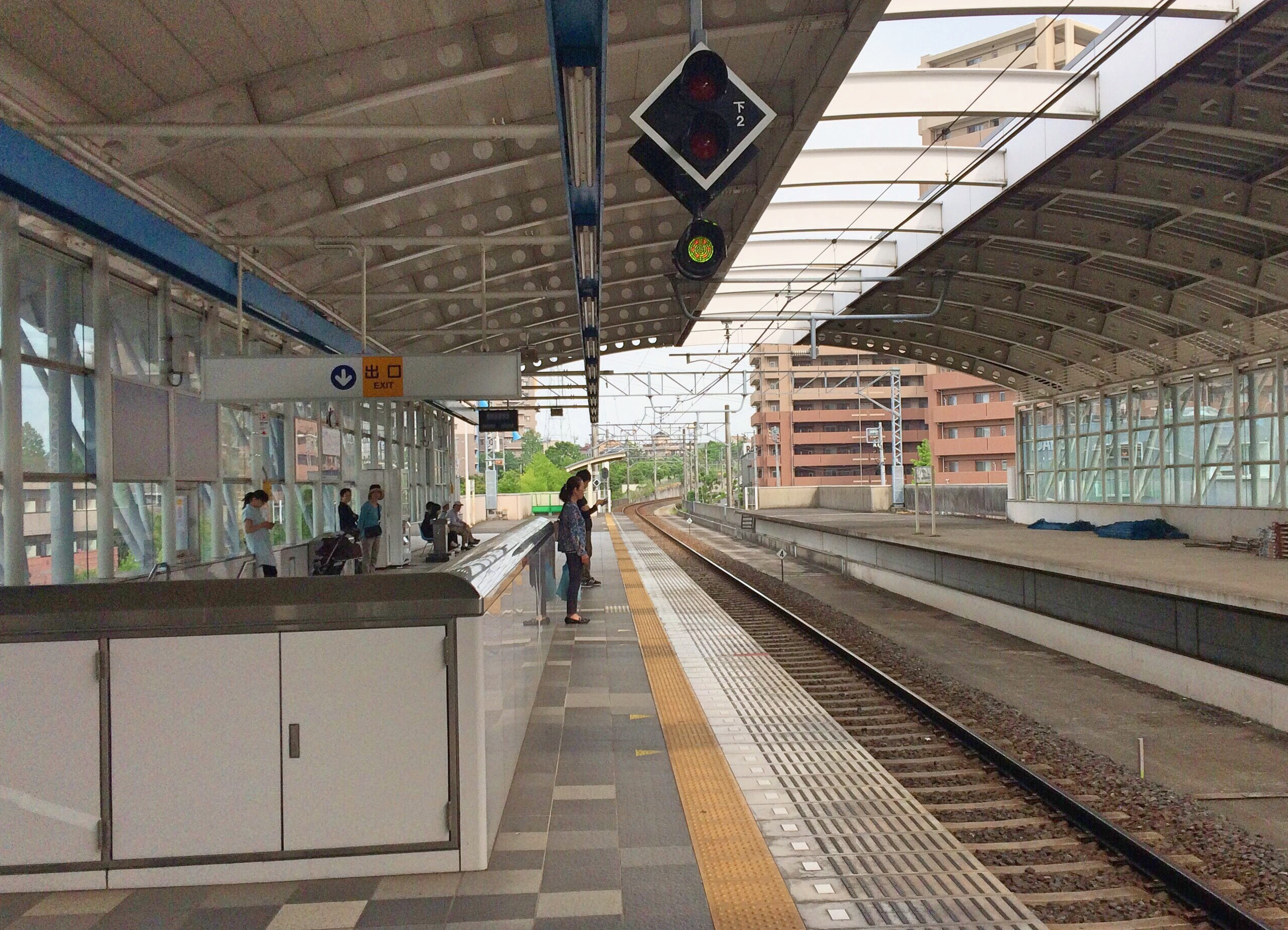 おゆみ野駅ホーム